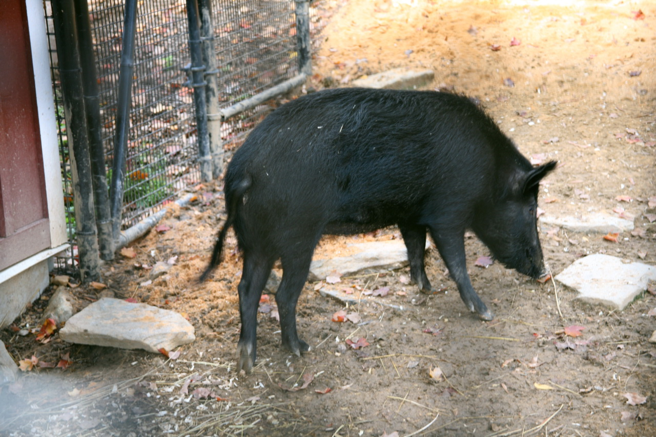 An Ossabaw Island Hog.